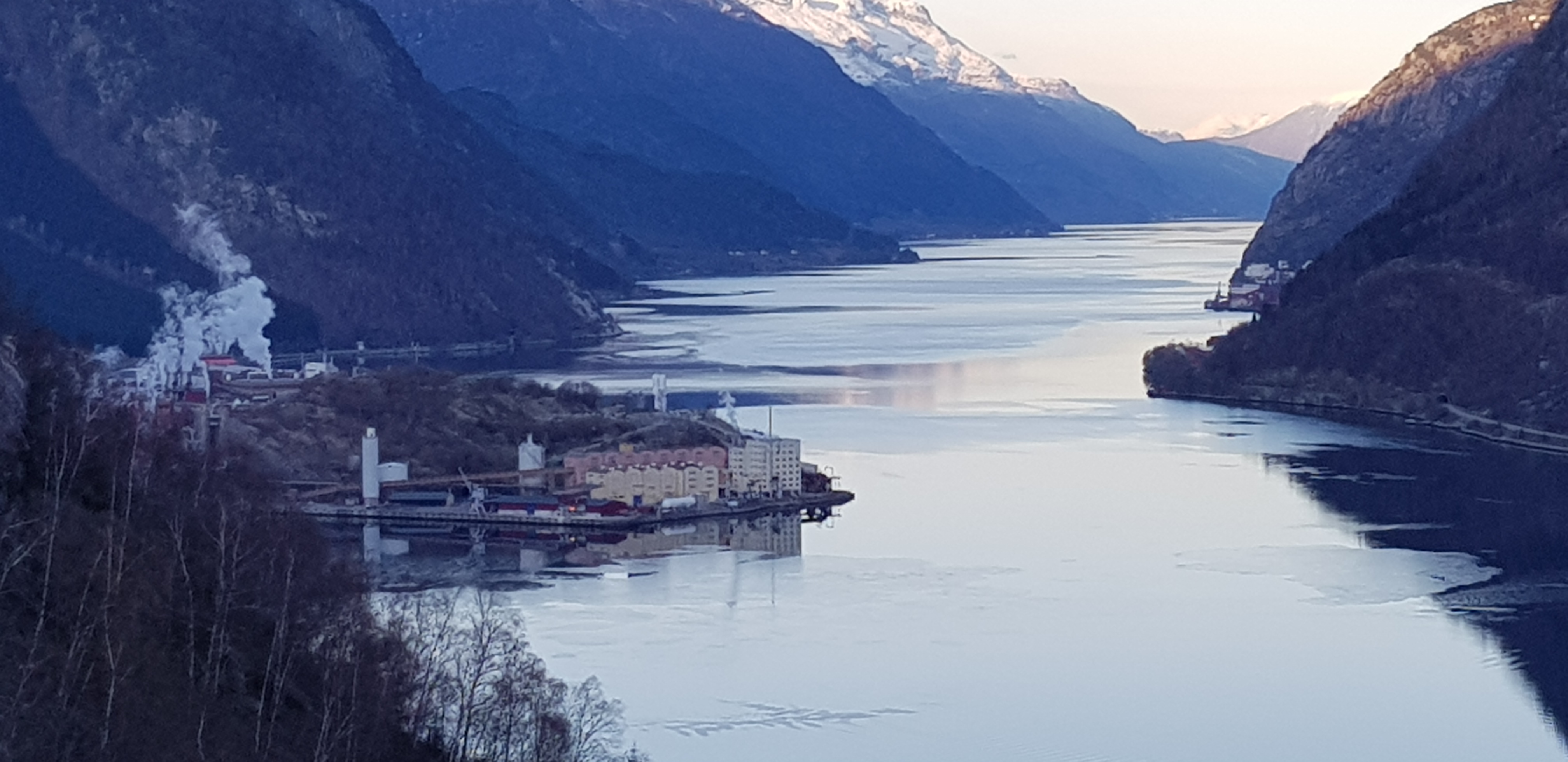 Oversiktsbilde av Noralf AS